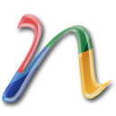 nLite logo